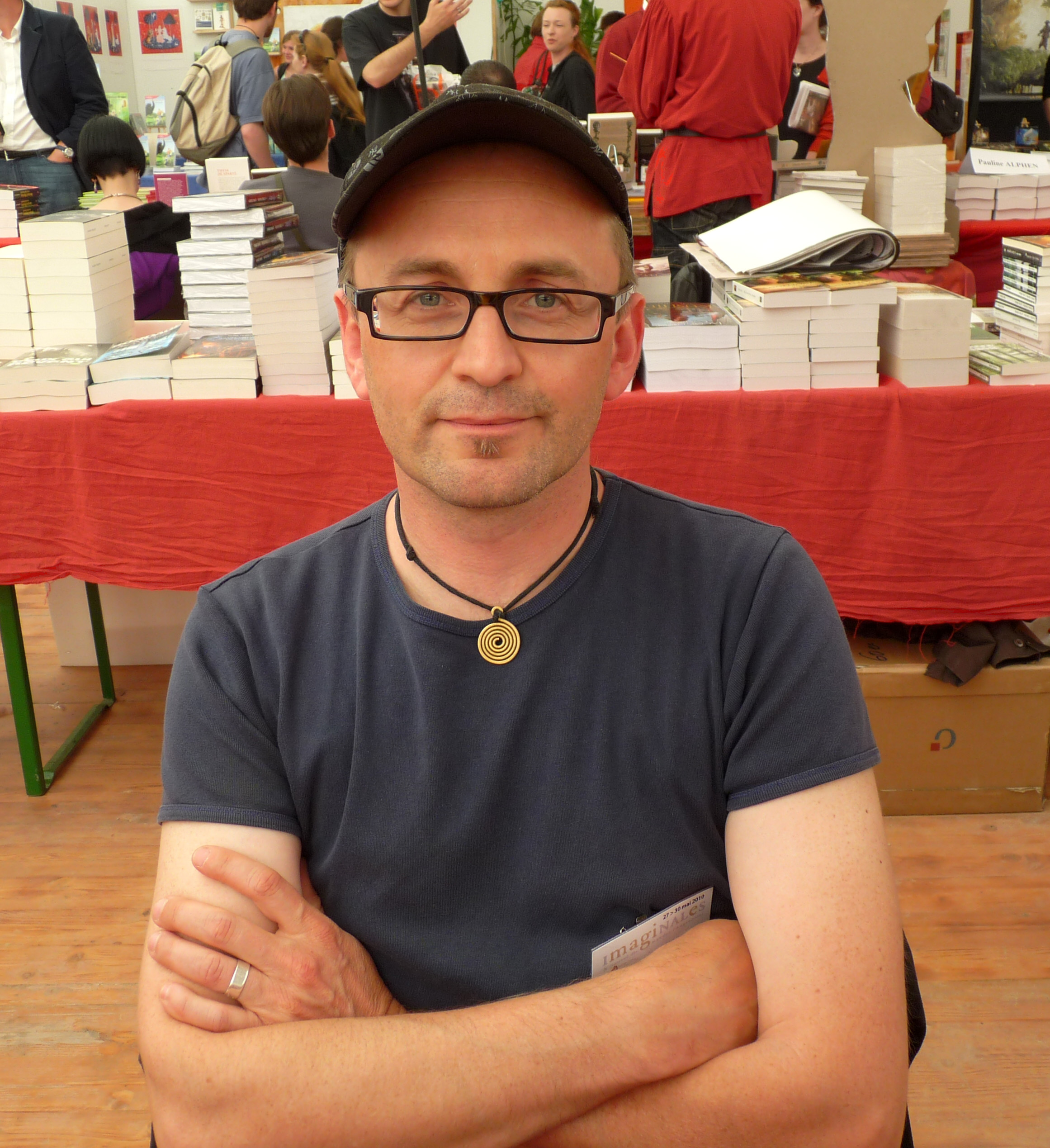 Jonas Lenn (Imaginales 2010, Epinal)